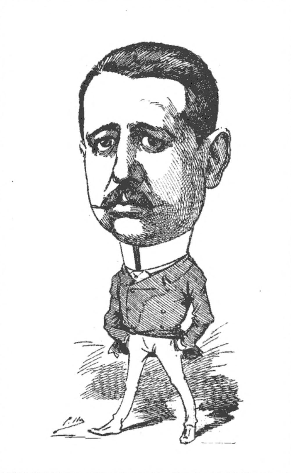 Eduardo Moreno Zancudo.